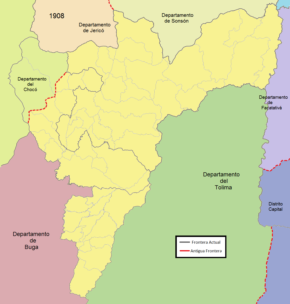 Caldas en 1908